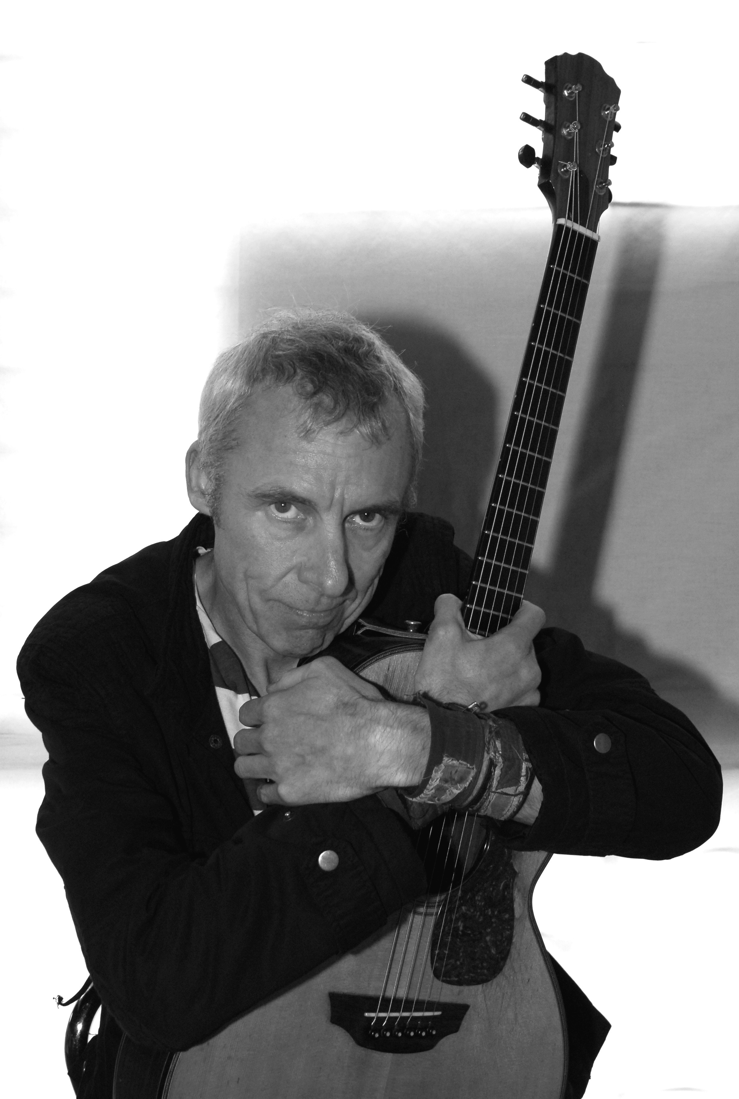 TV Smith